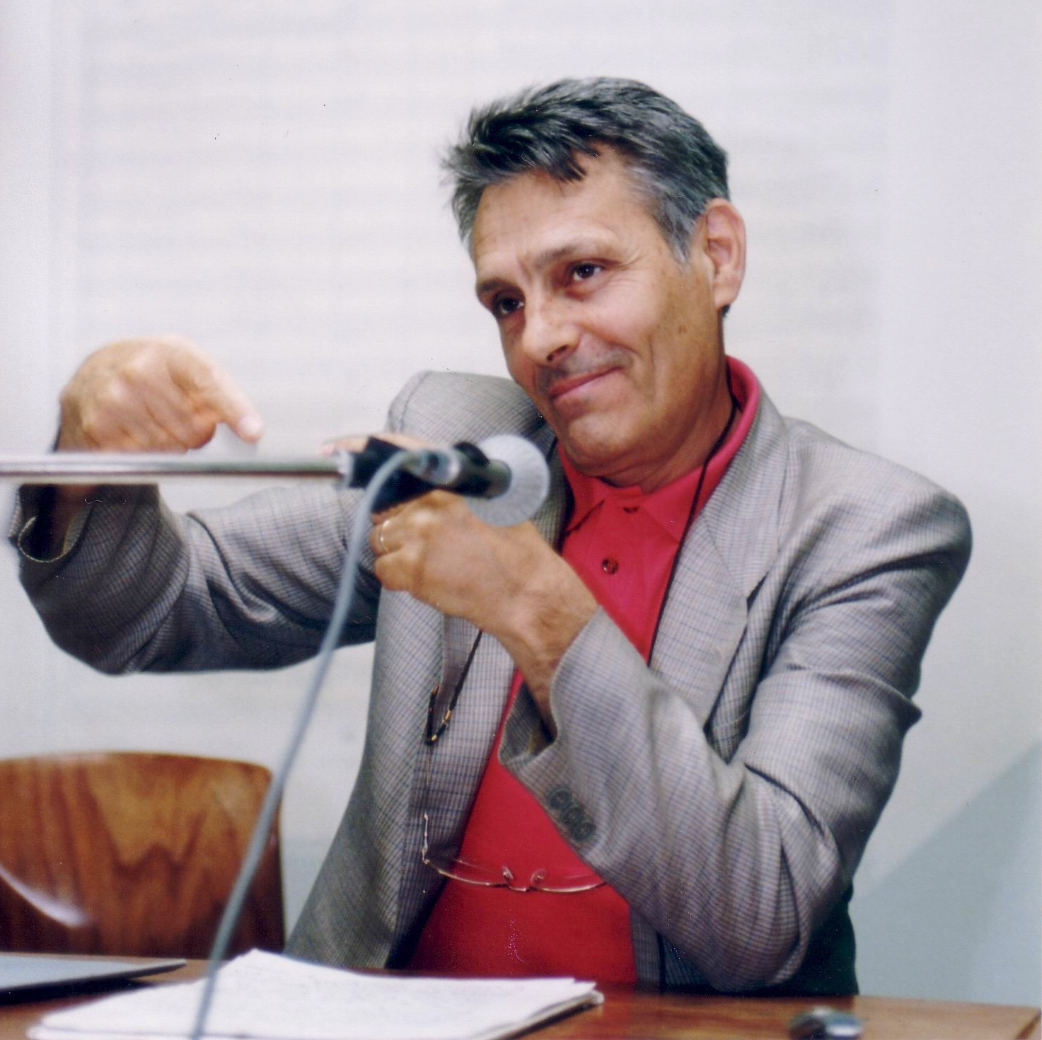 Il compositore classico, Franco Oppo